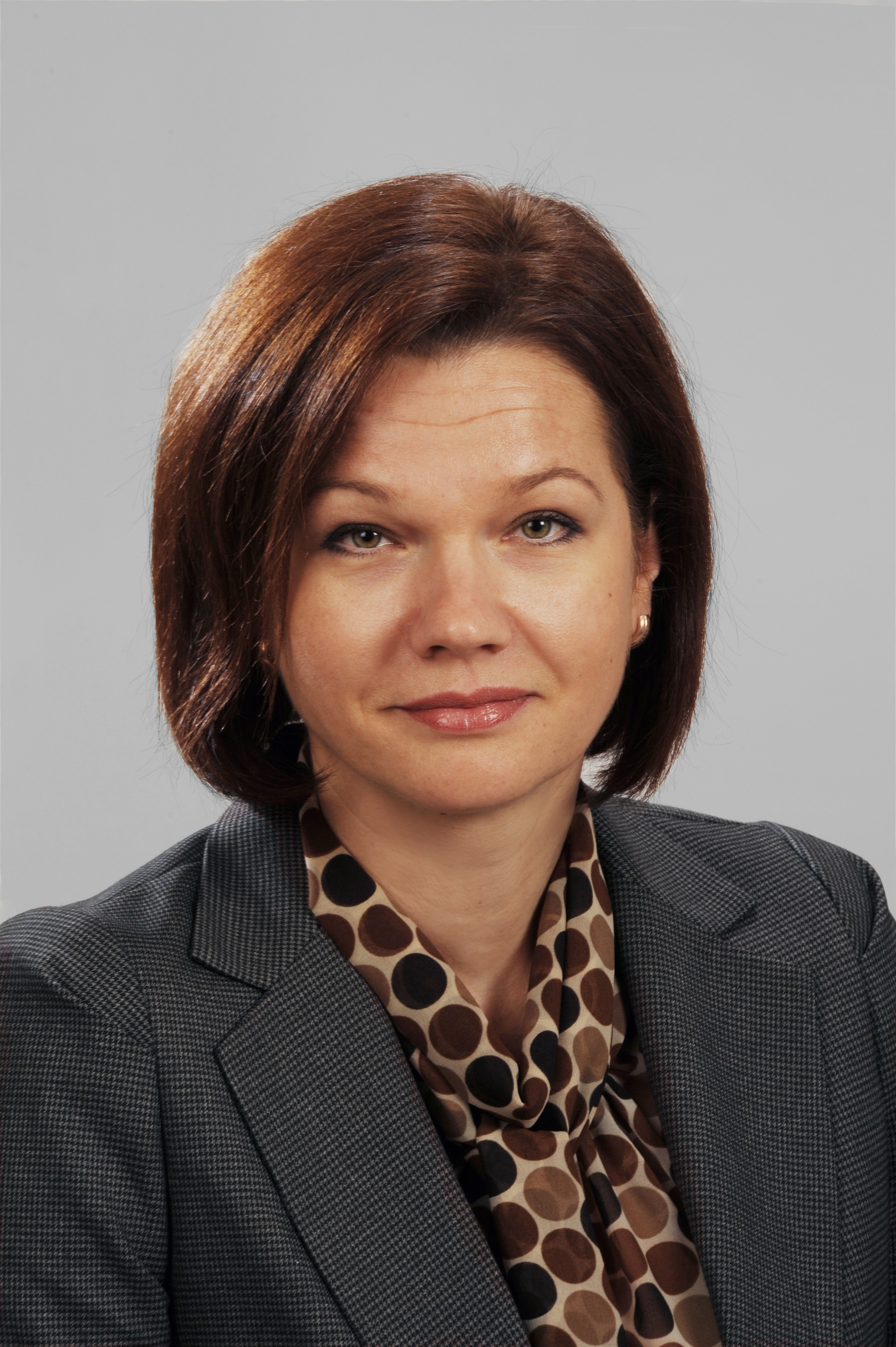 Foto: Uldis Pāže, Saeimas Kanceleja